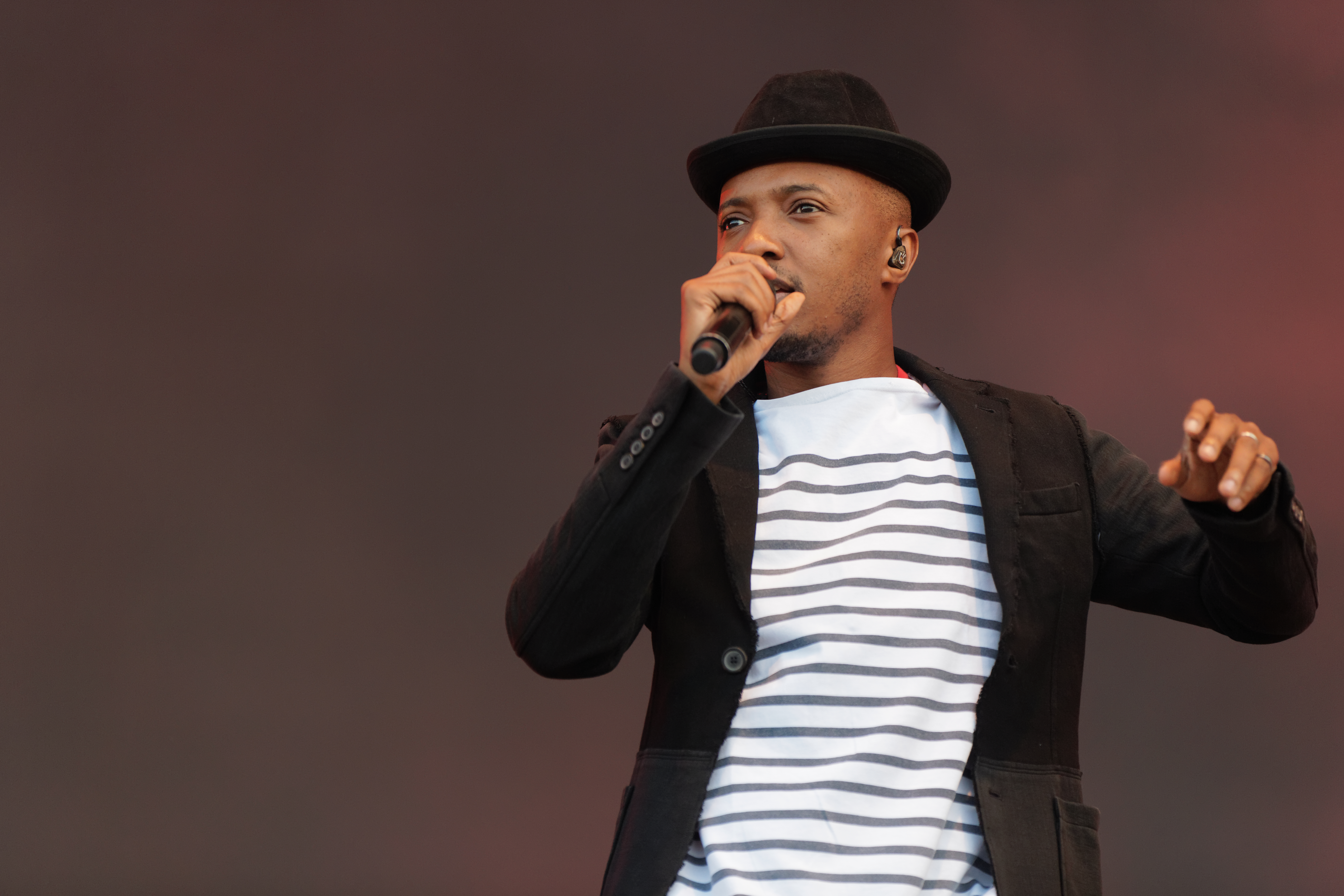 Le festival des vieilles charrues 2015.